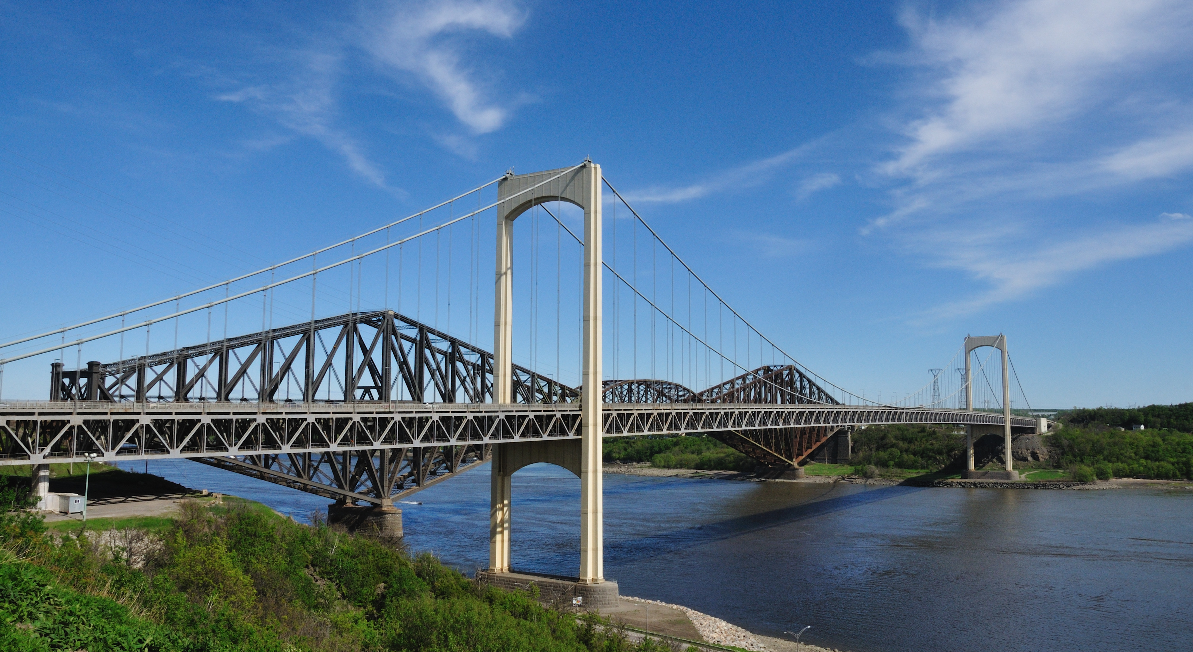 Pont Pierre-Laporte